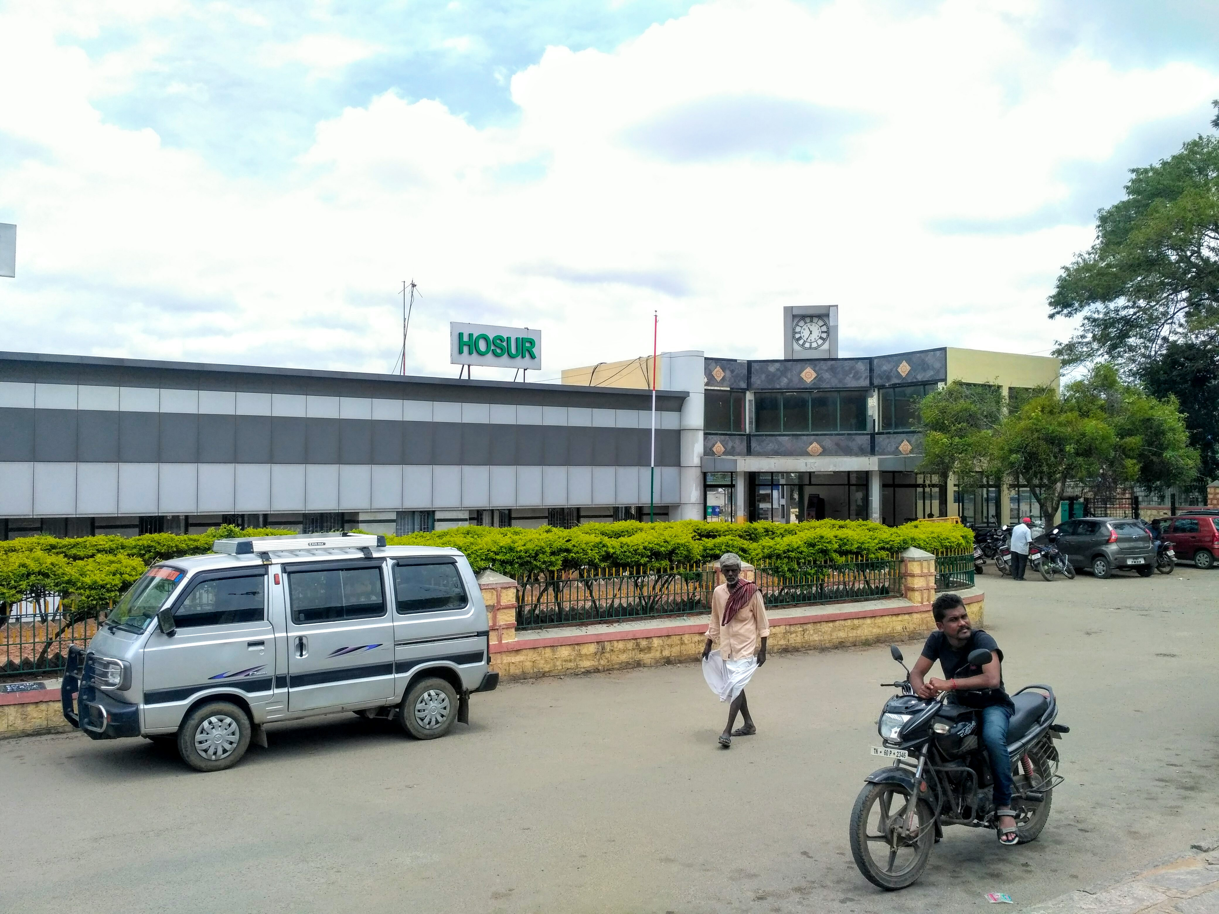 ஓசூர் இரயில் நிலையம் ...